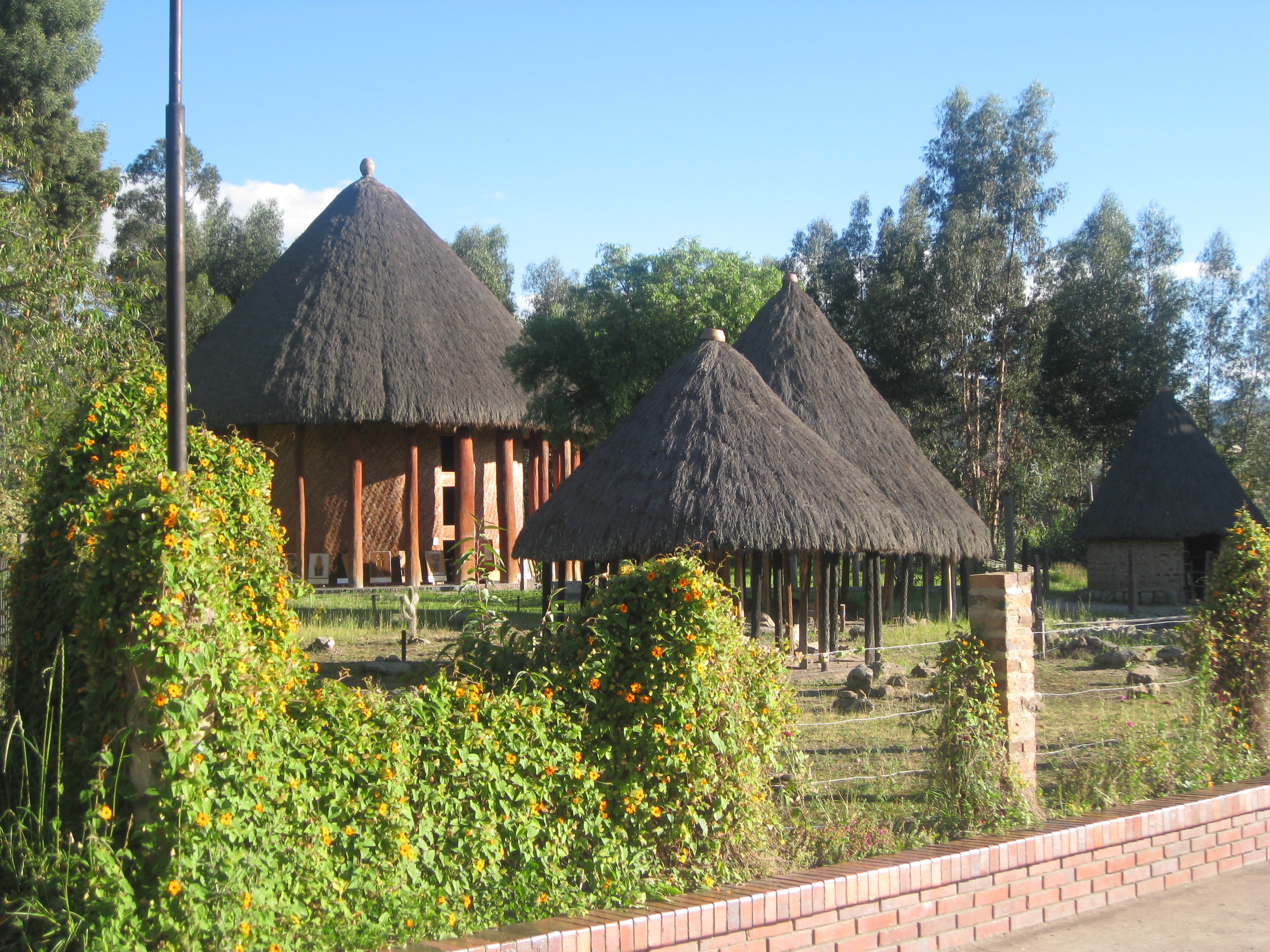 Malokas - Museo del sol